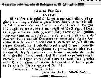 Eredità di Zaccaria Banti